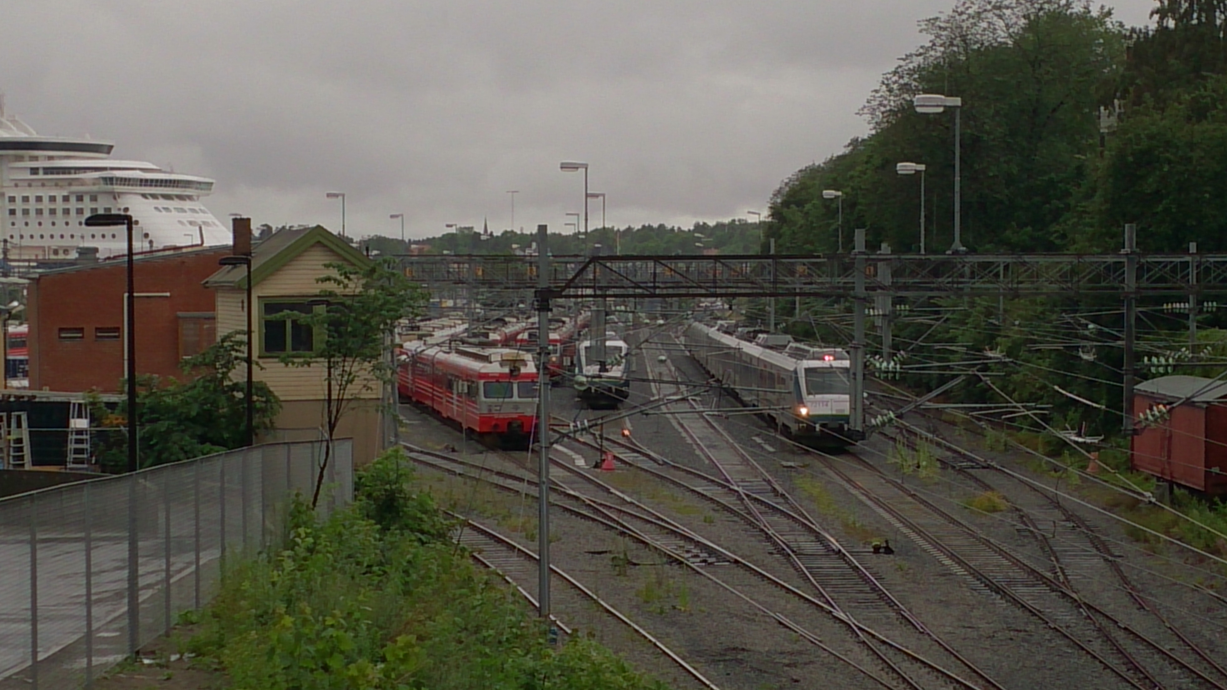 Jernbanegård på Filipstad i Oslo.